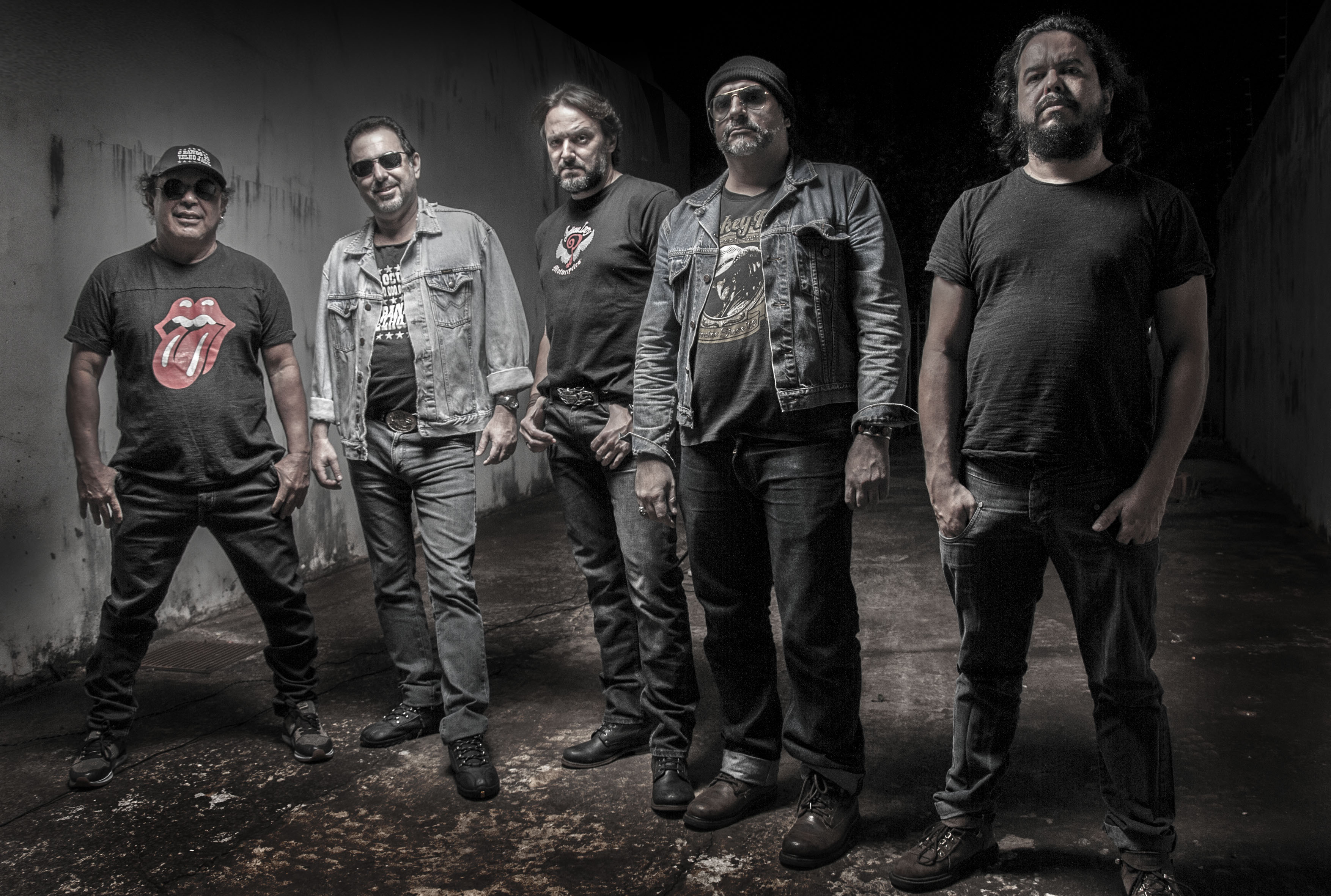 odrigo Tozzette (guitarra e vocal), Marcos Yallouz (baixo), Fábio "Corvo" Terra (guitarra), Alex "Fralda" Cavalheri (teclados) e João Bosco (bateria)